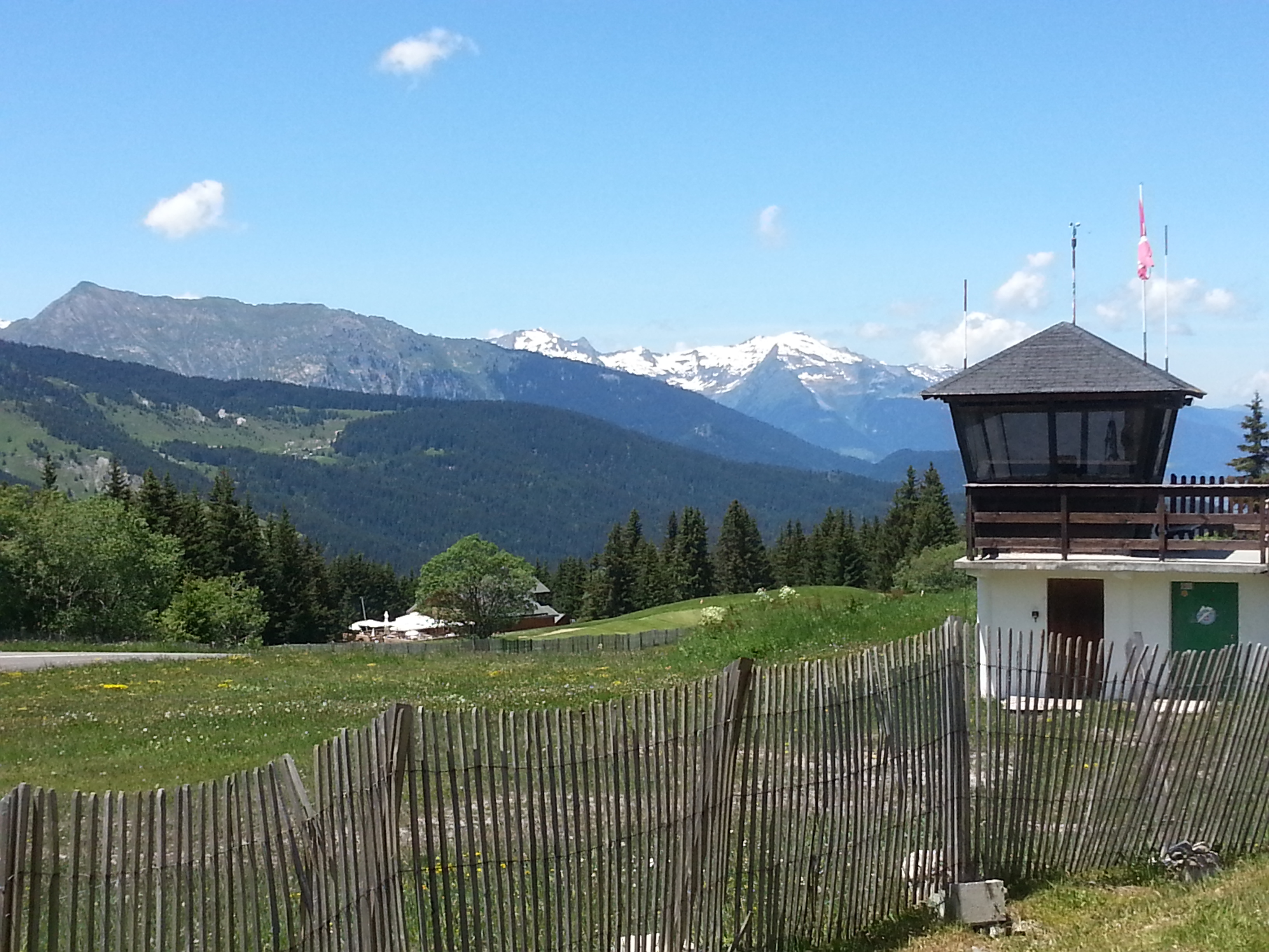 altiport de Meribel (LFKX)